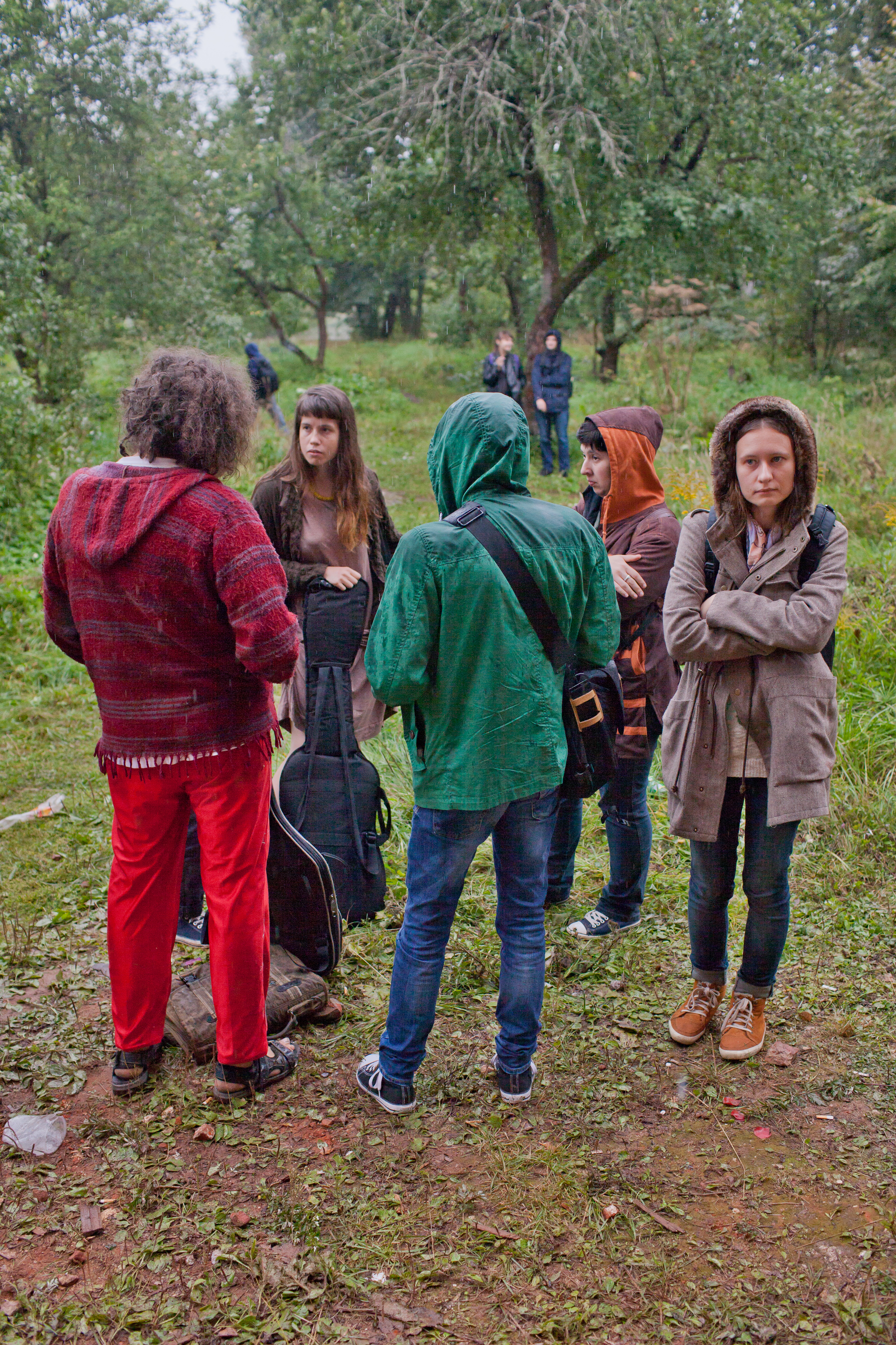 Антон Николаев (крайний слева) с группой художников